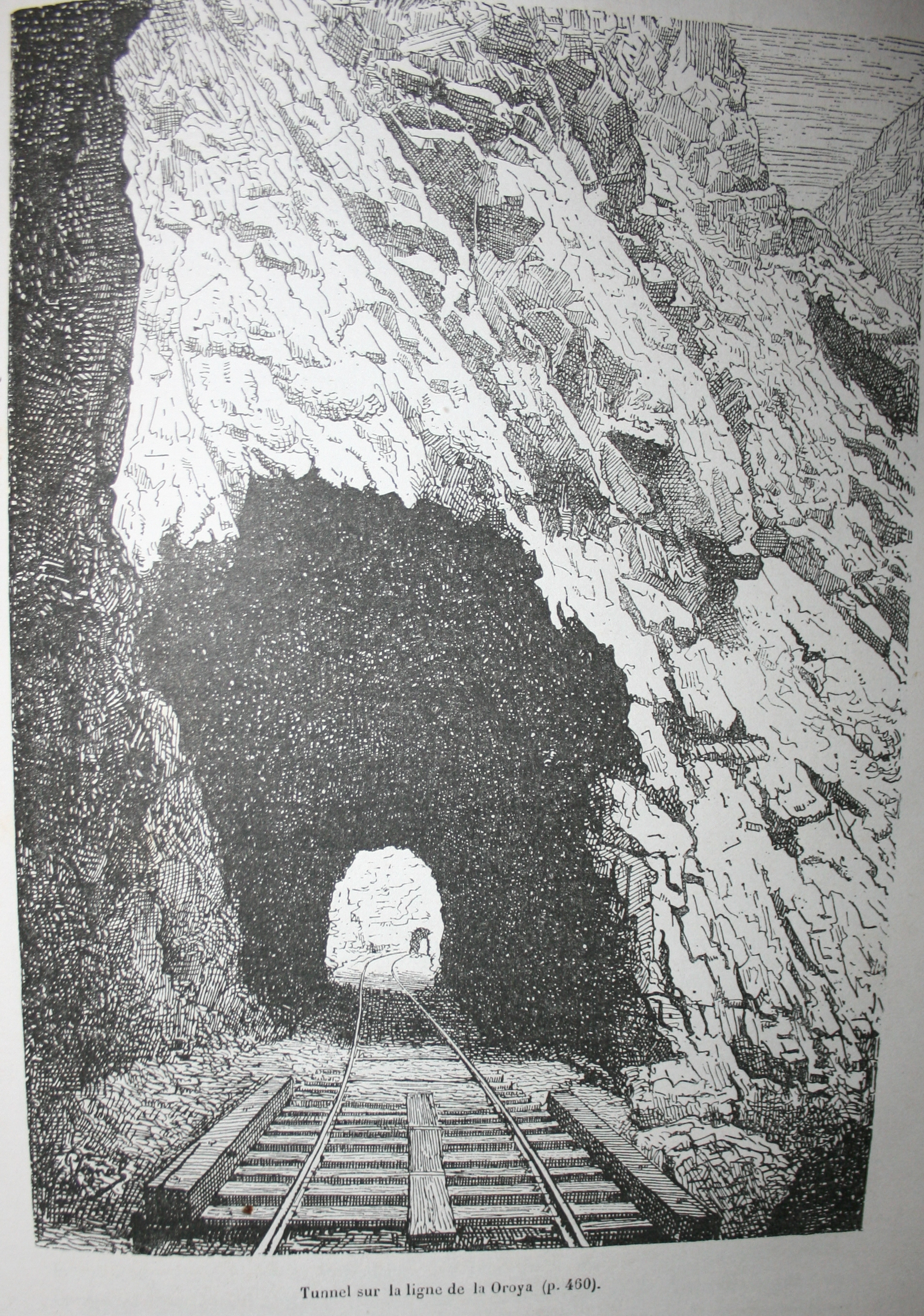 Dessin de Charles Wiener, Tunnel sur la ligne de la Oroya